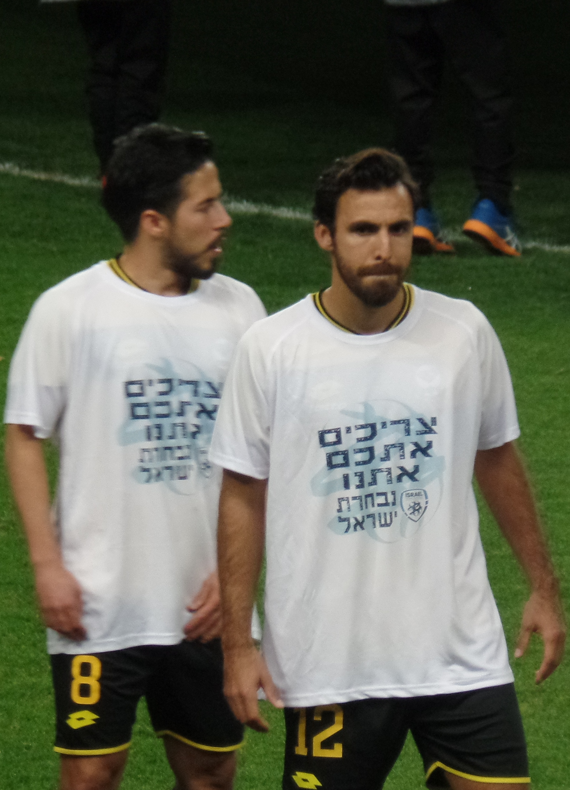 ג'ונתן בורנשטיין ויאהמיר היקה, במדי מכבי נתניה, 2019